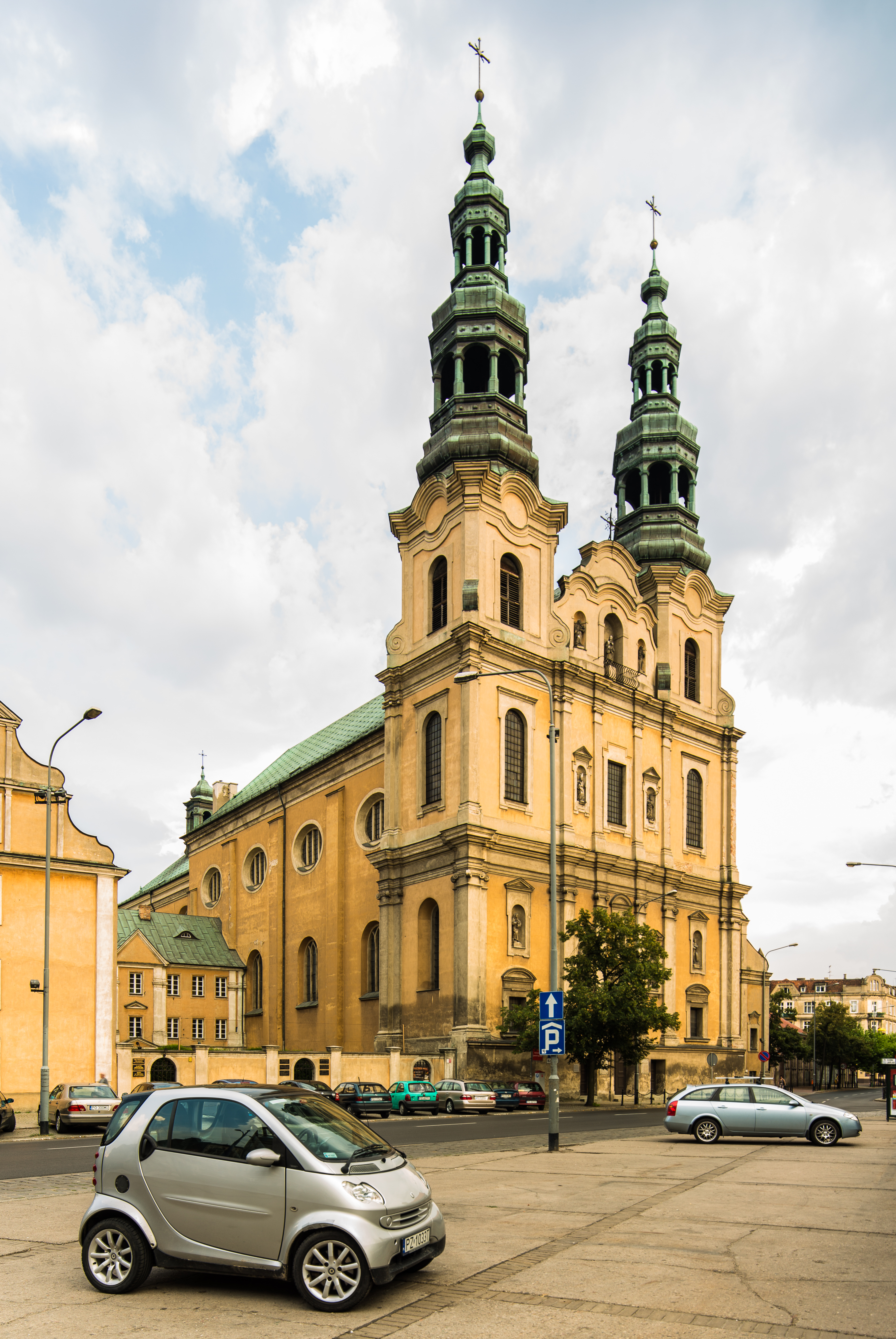 Poznań, kościół p.w. św. Franciszka, 1658-1668, XVIII, 1948